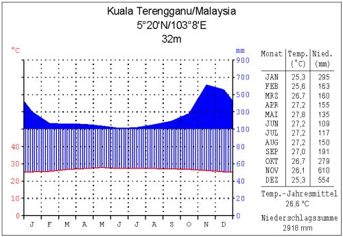 Klimadiagramm Kuala Terengganu (selbst erstellt, GNU-FDL)